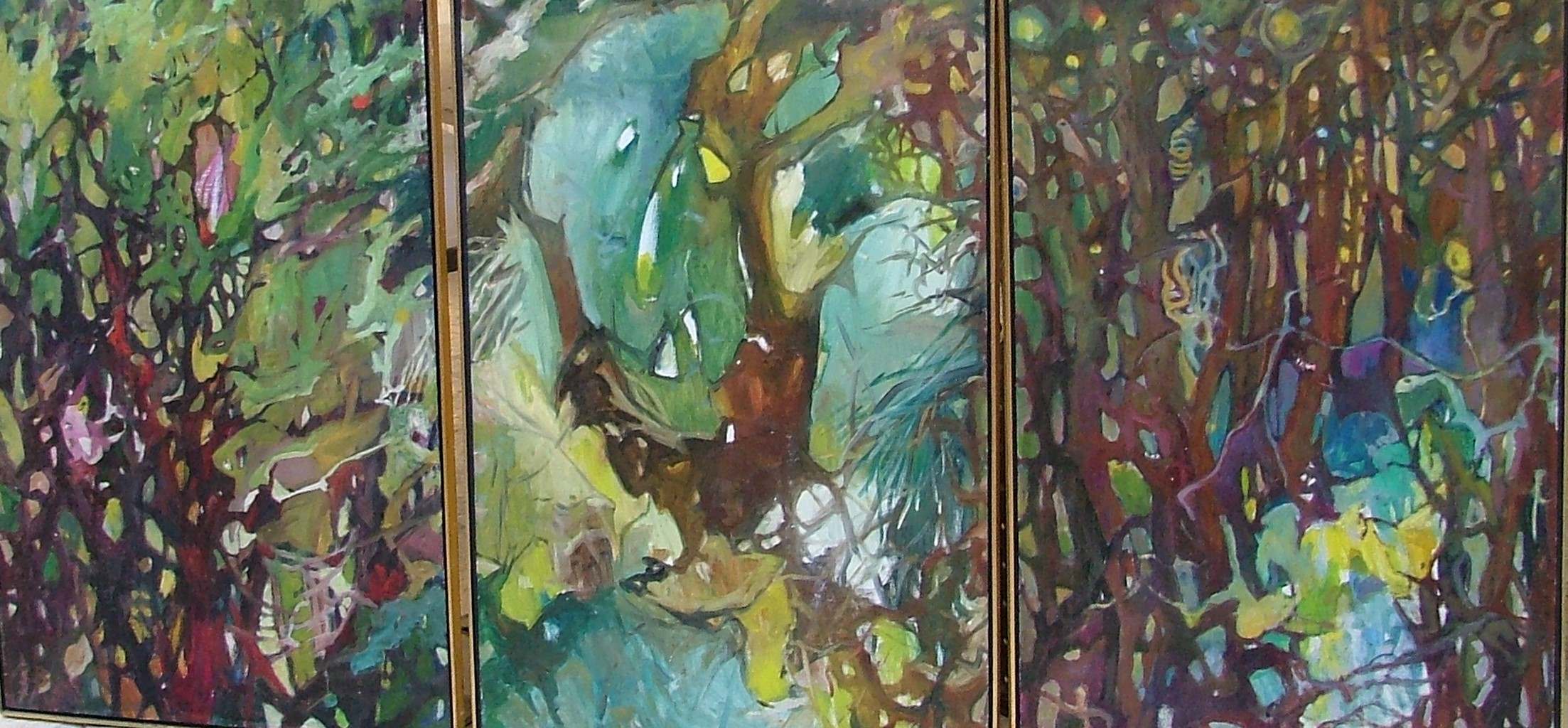 טריפטיך ציור שמן רות במברגר